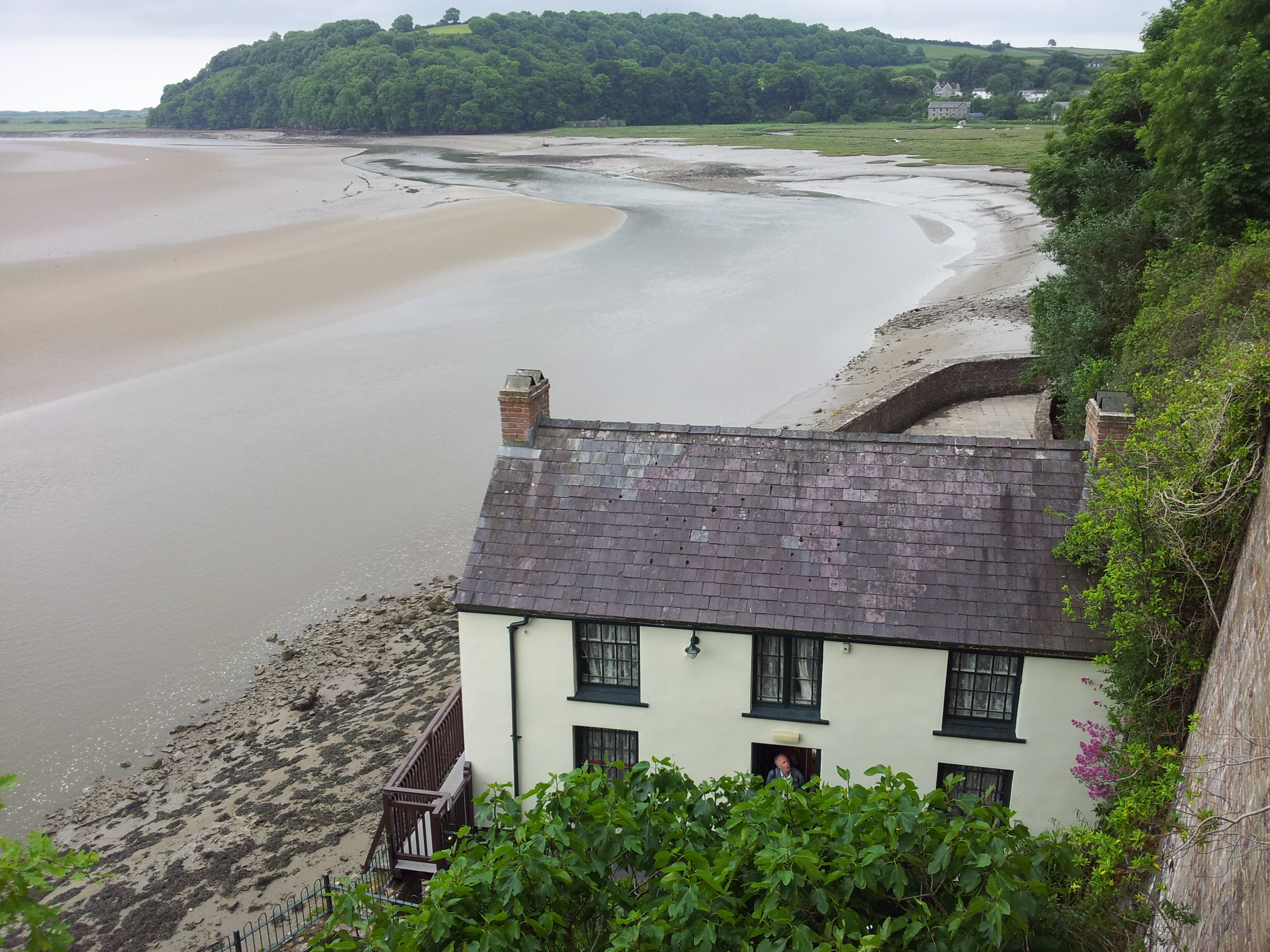 Blick auf das Dylan Thomas Boathouse und die Trichtermündung des Taf, Wales